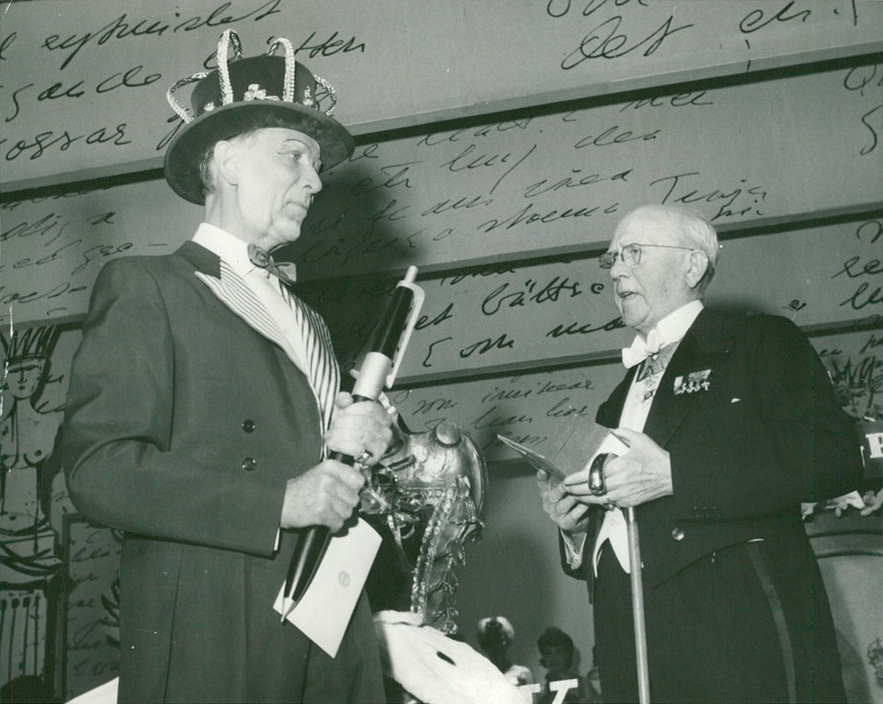 Rune Carlsten hyllar Karl Gerhard under hans 70-årsfirande på Idéonteatern. Införd i Svenska Dagbladet 1961-04-15.